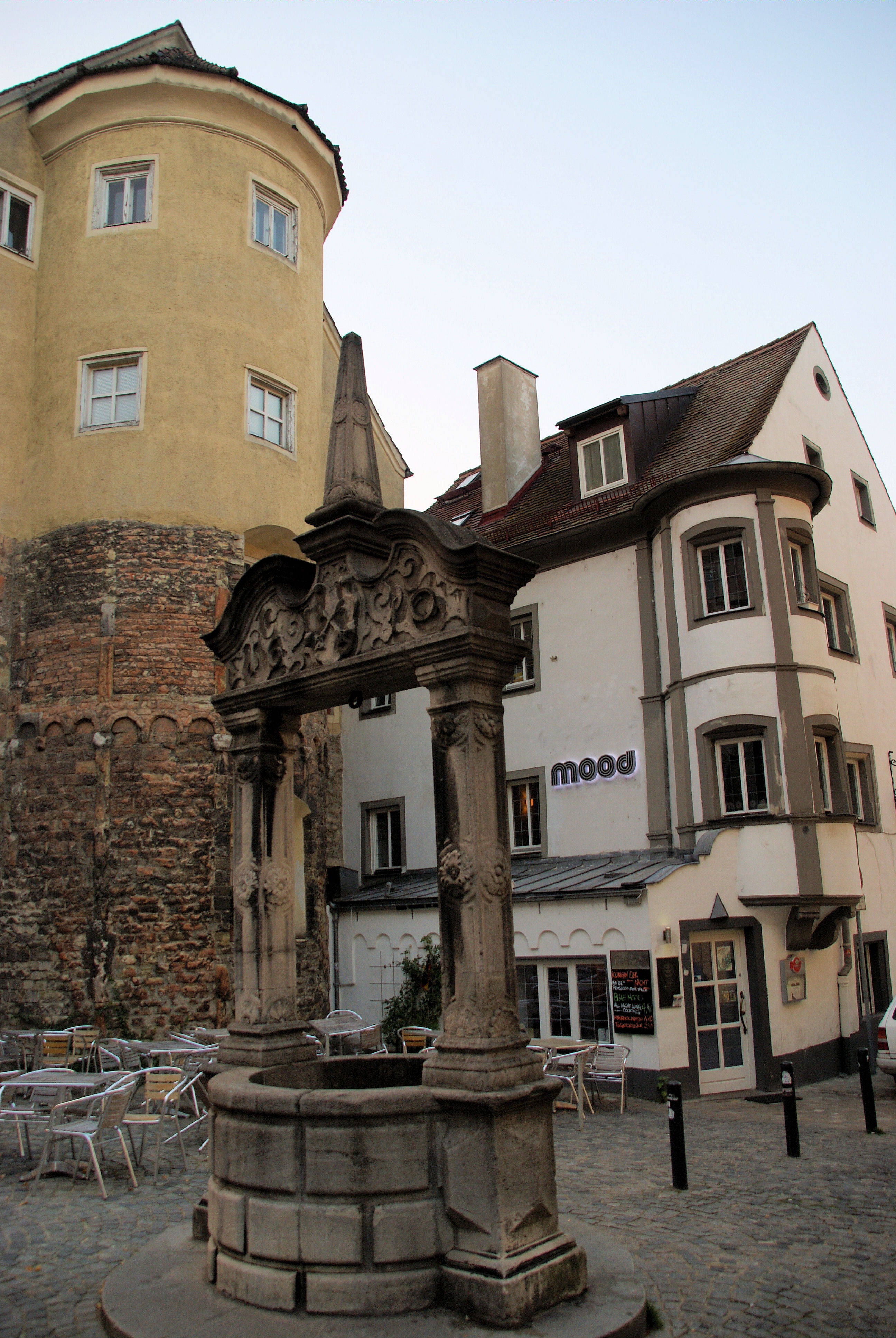 Ziehbrunnen, Galgen auf Pilastern, mit Obelisk, Renaissance, 1610, 1906 erneuertThis is a photograph of an architectural monument.